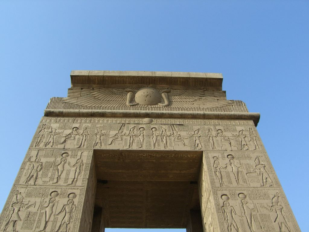 La grande porte d'accès du temple de Khonsou à Karnak - Dynastie ptolémaïque